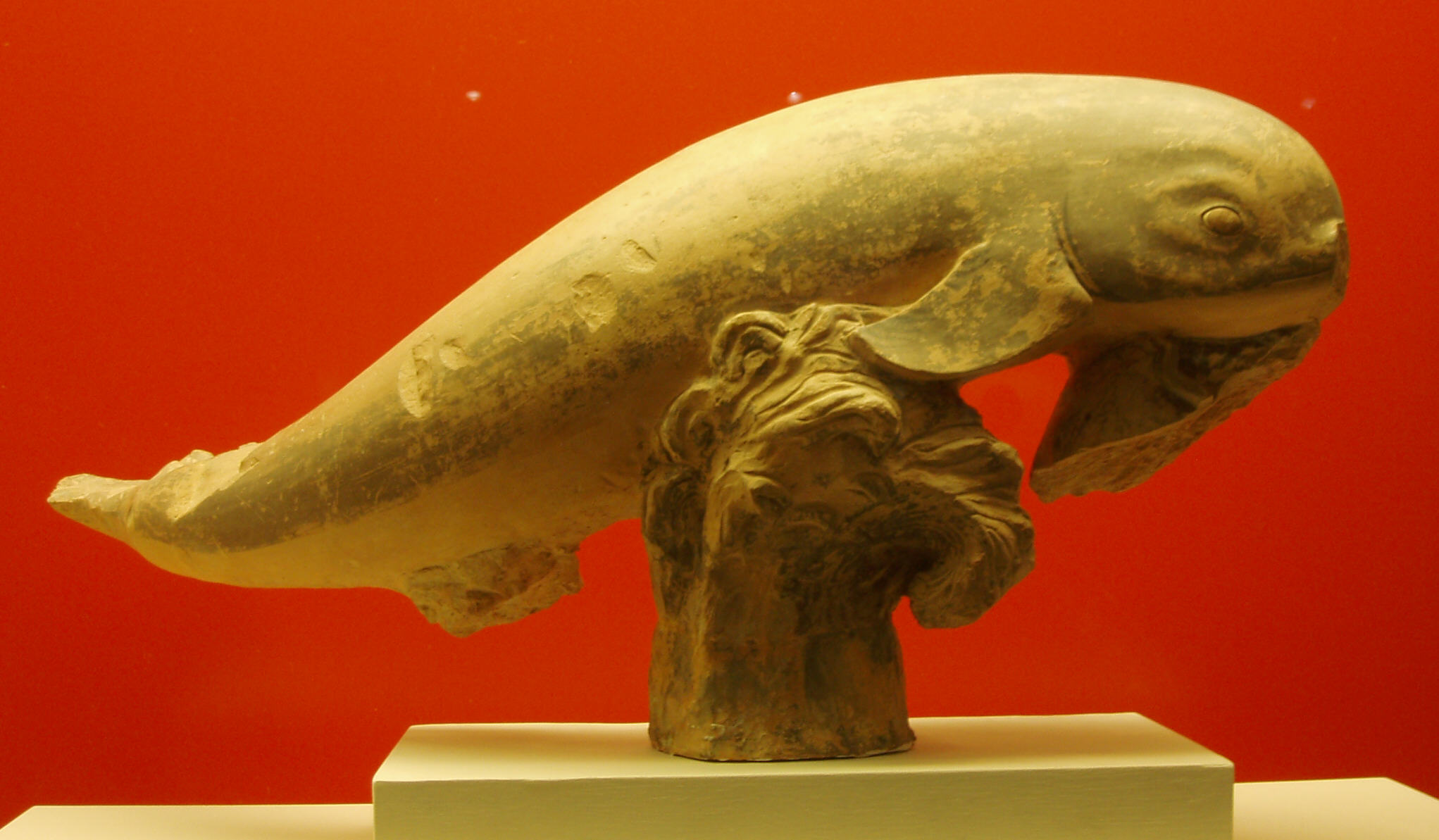 Delphindarstellung, archäolog. Museum Olympia